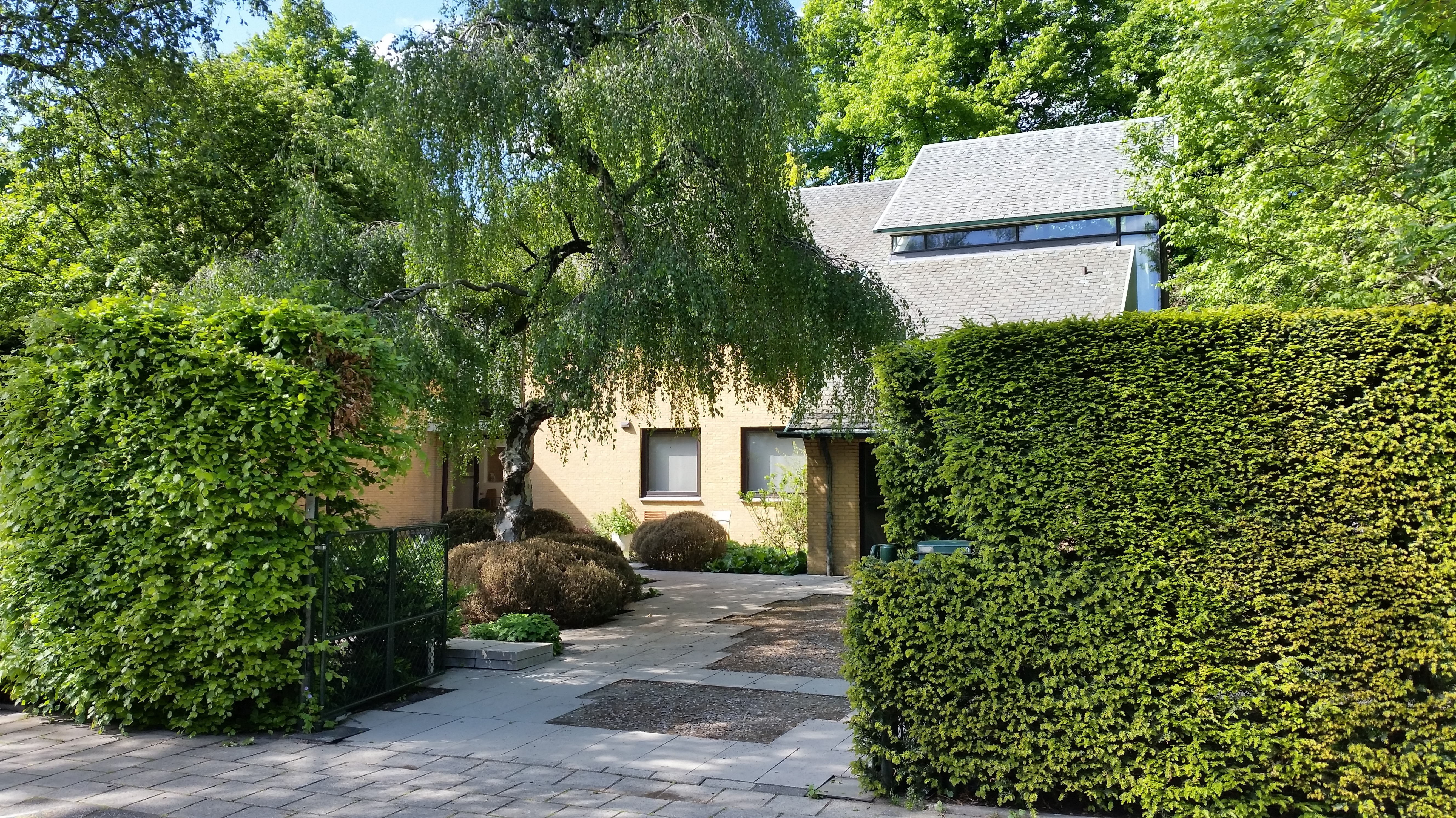 Willem Kesstraat, Amsterdam